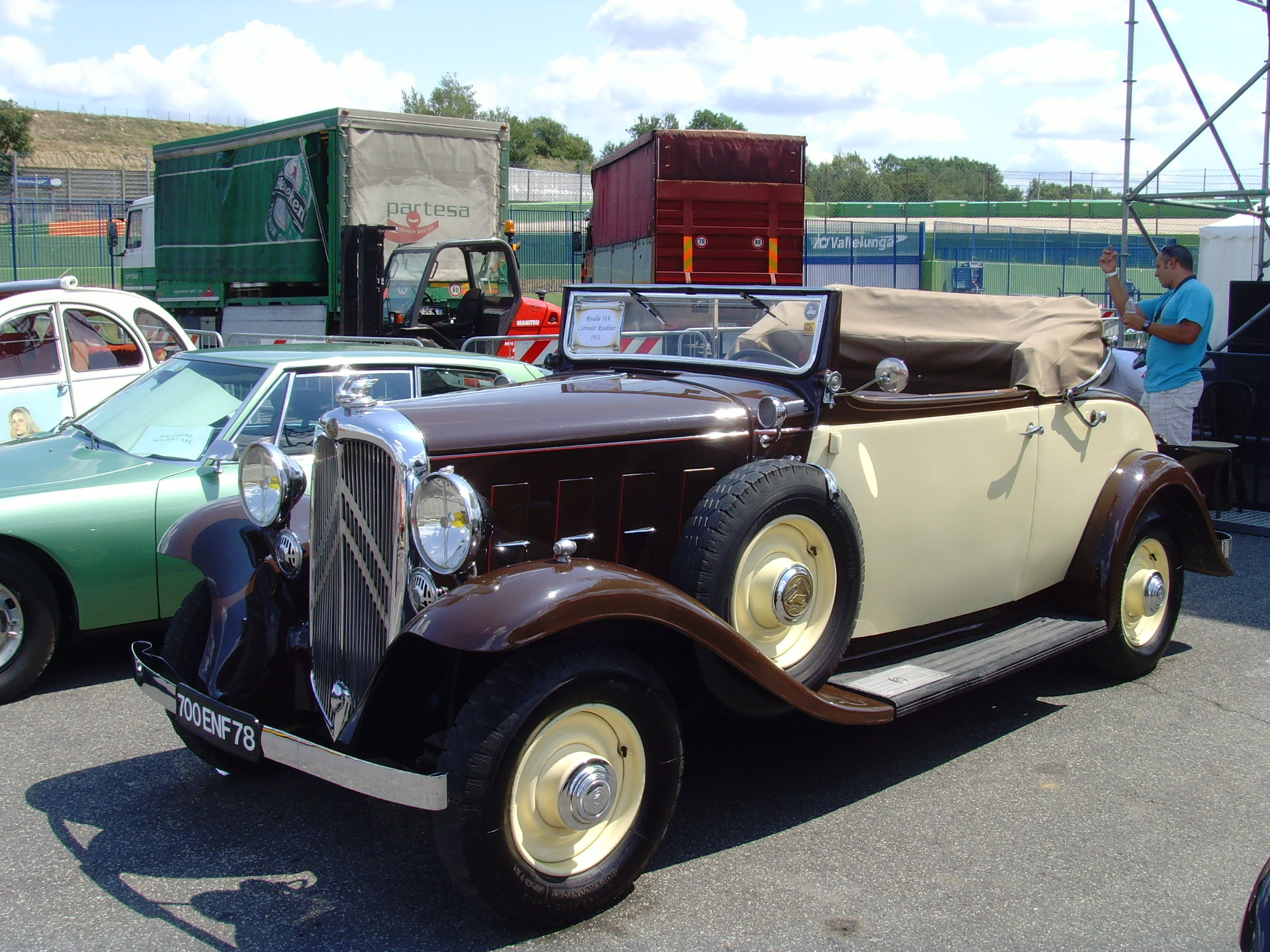 Citroën 10 Rosalie Cabriolet del 1933